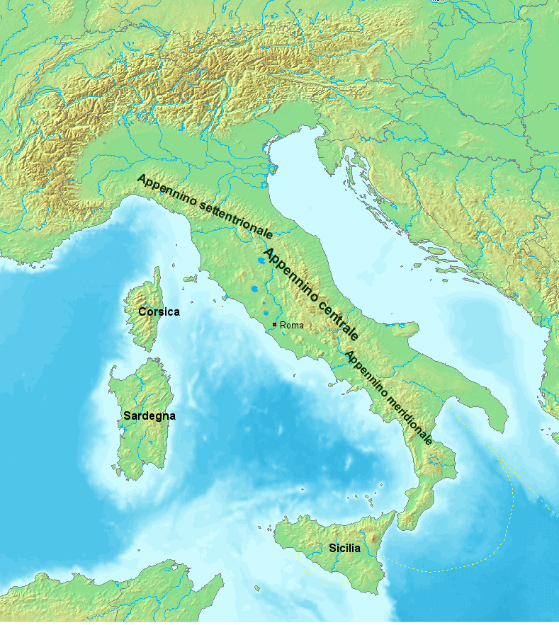 Italia fisica - Appennini Categoria:Appennini